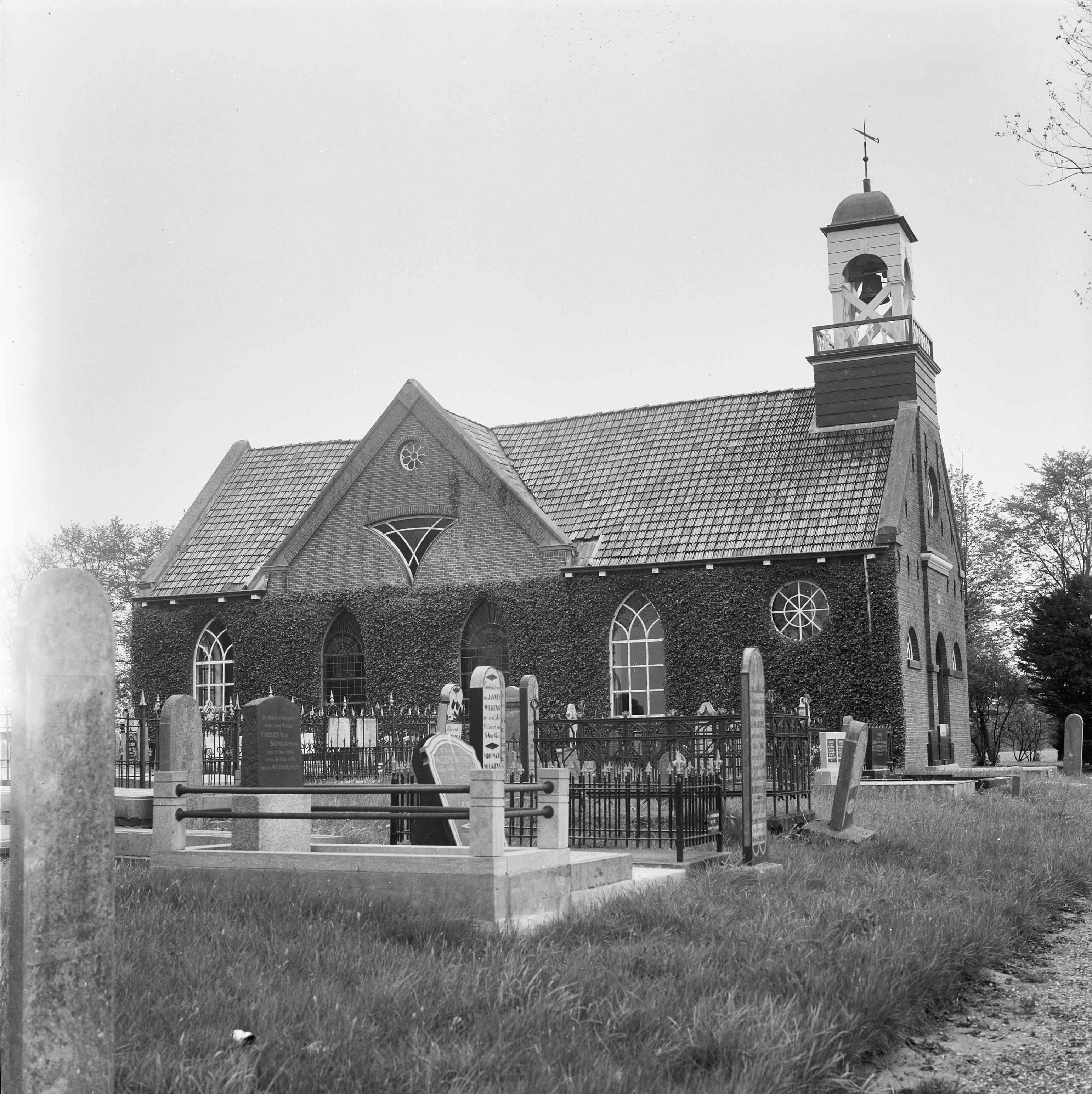 Kerk: exterieur